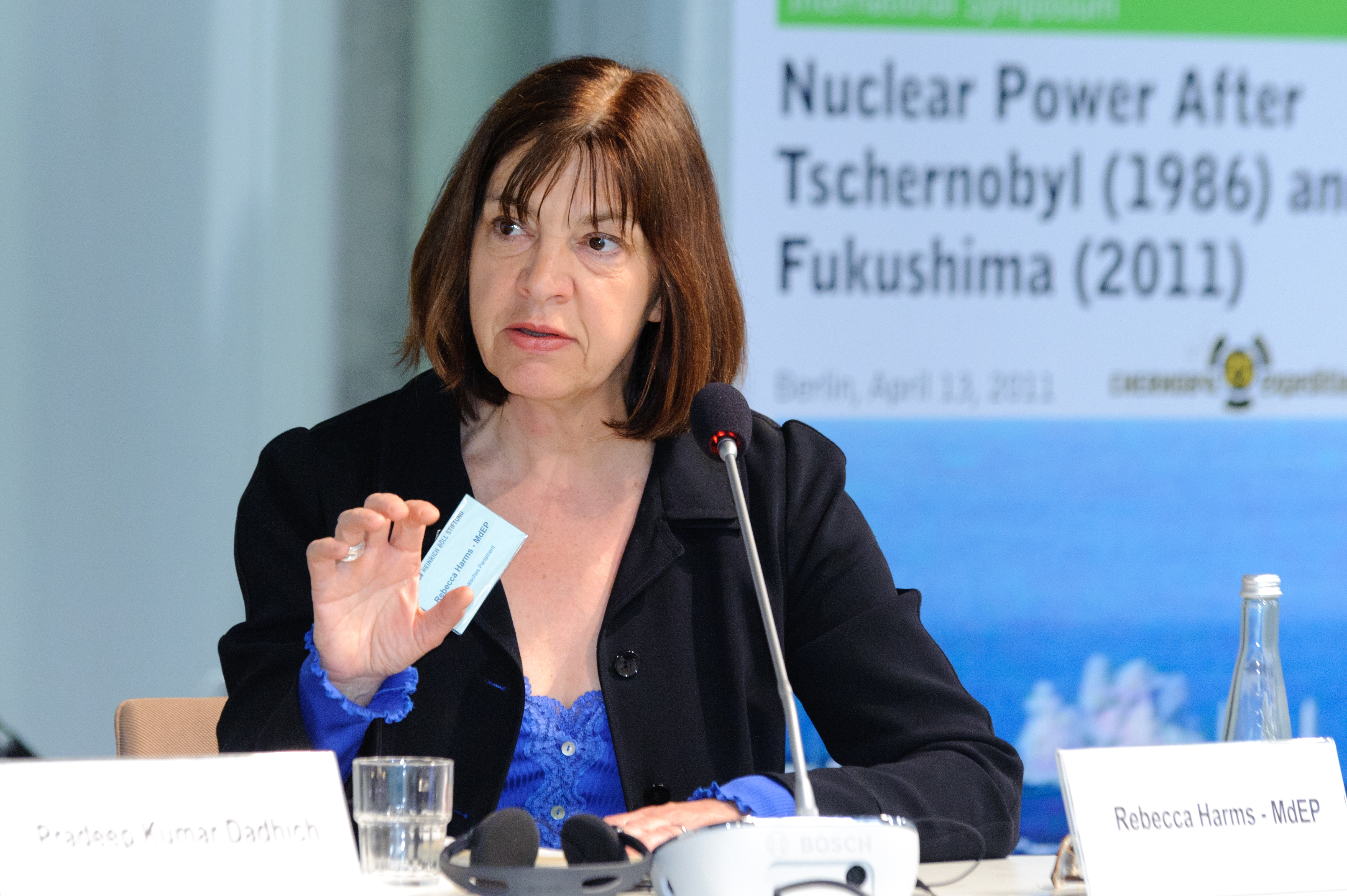 Rebecca Harms, MdEP Die Grünen/EFA Foto: Stephan Röhl